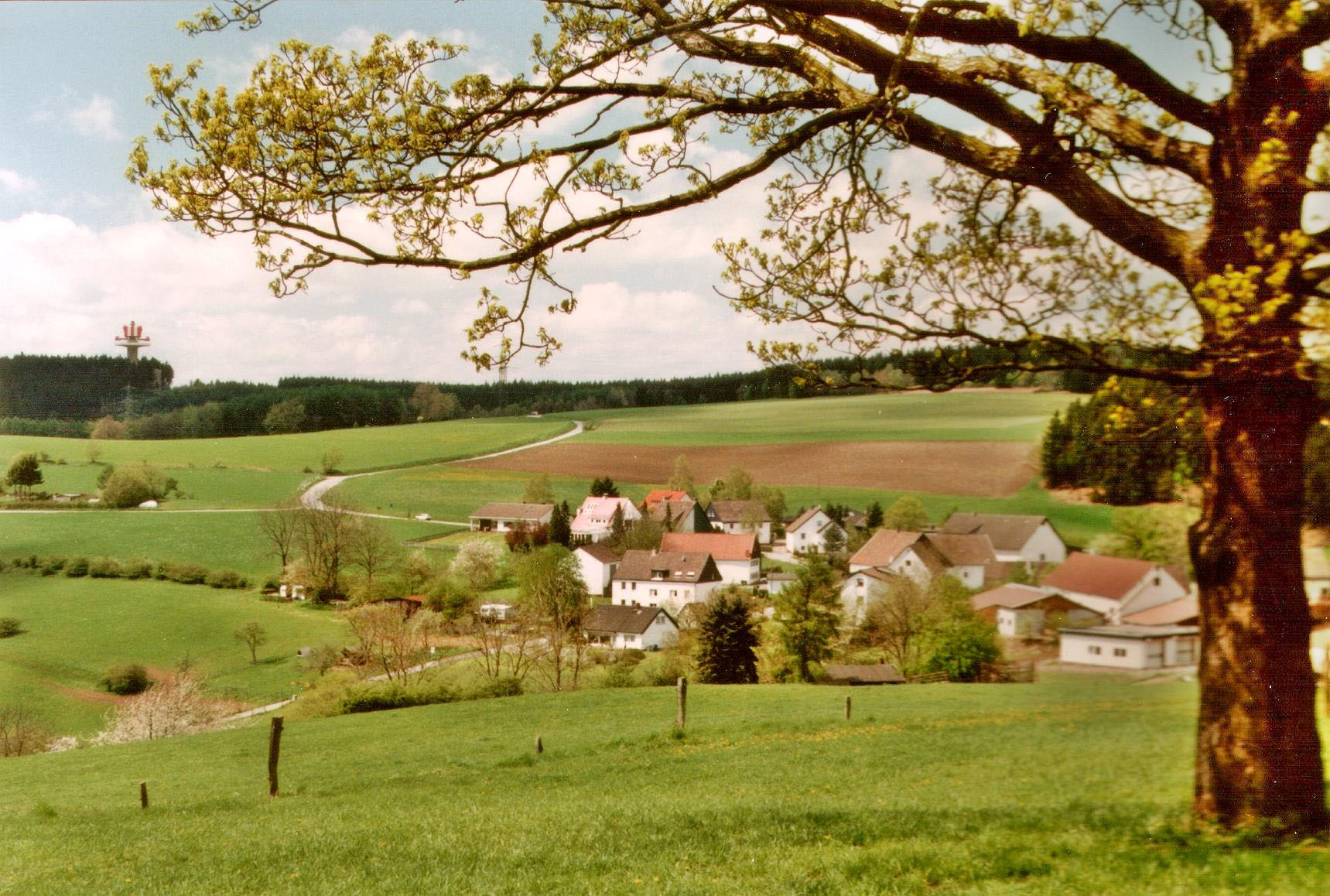 Blick vom Höhenbaum auf Großendrescheid